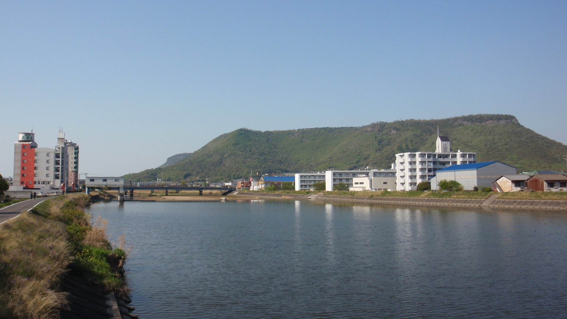 香川県三木町及び高松市を流れる新川の高松市春日町新川橋付近。背景は屋島。